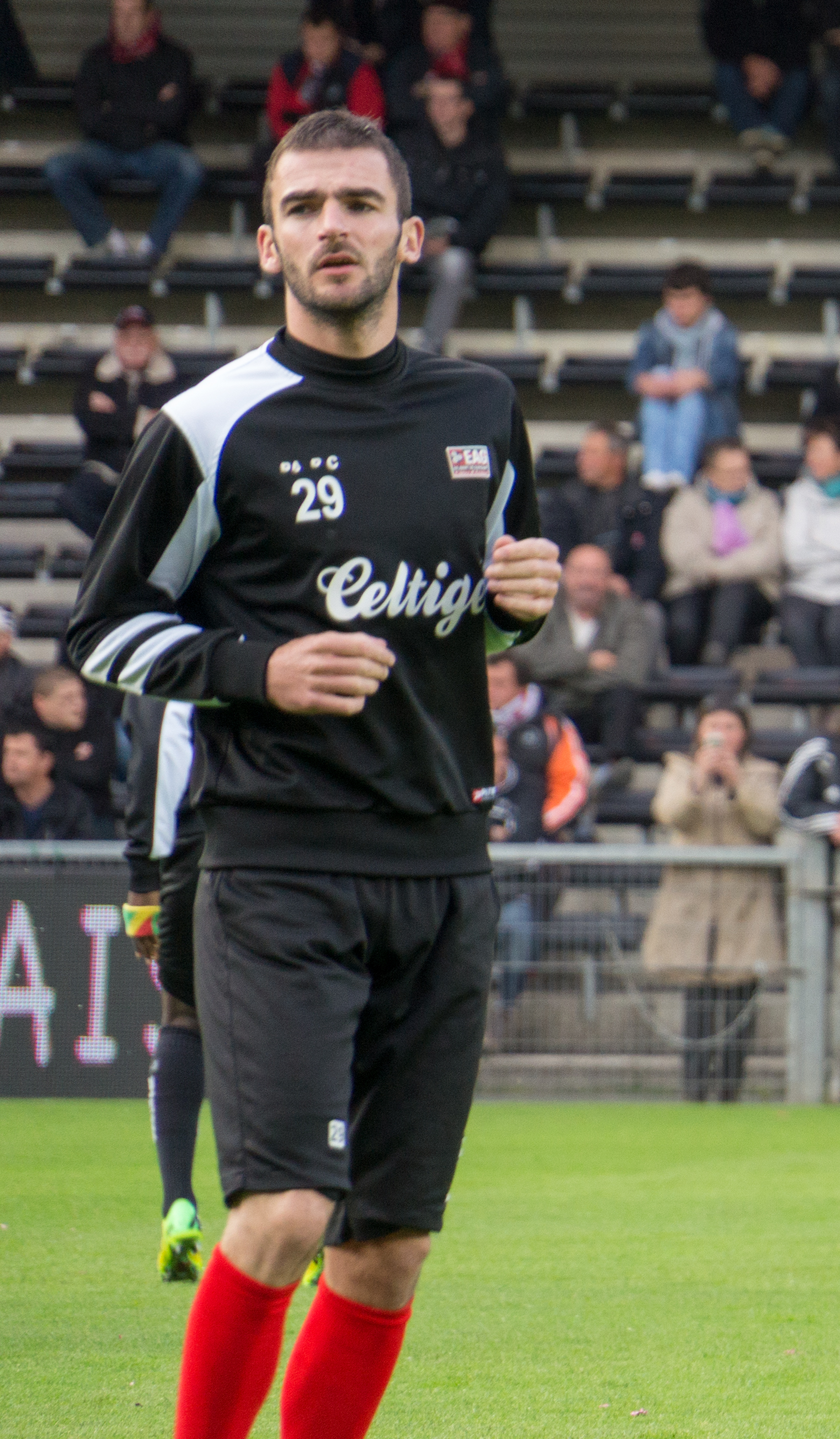 Guingamp-Toulouse le 10 mai 2014